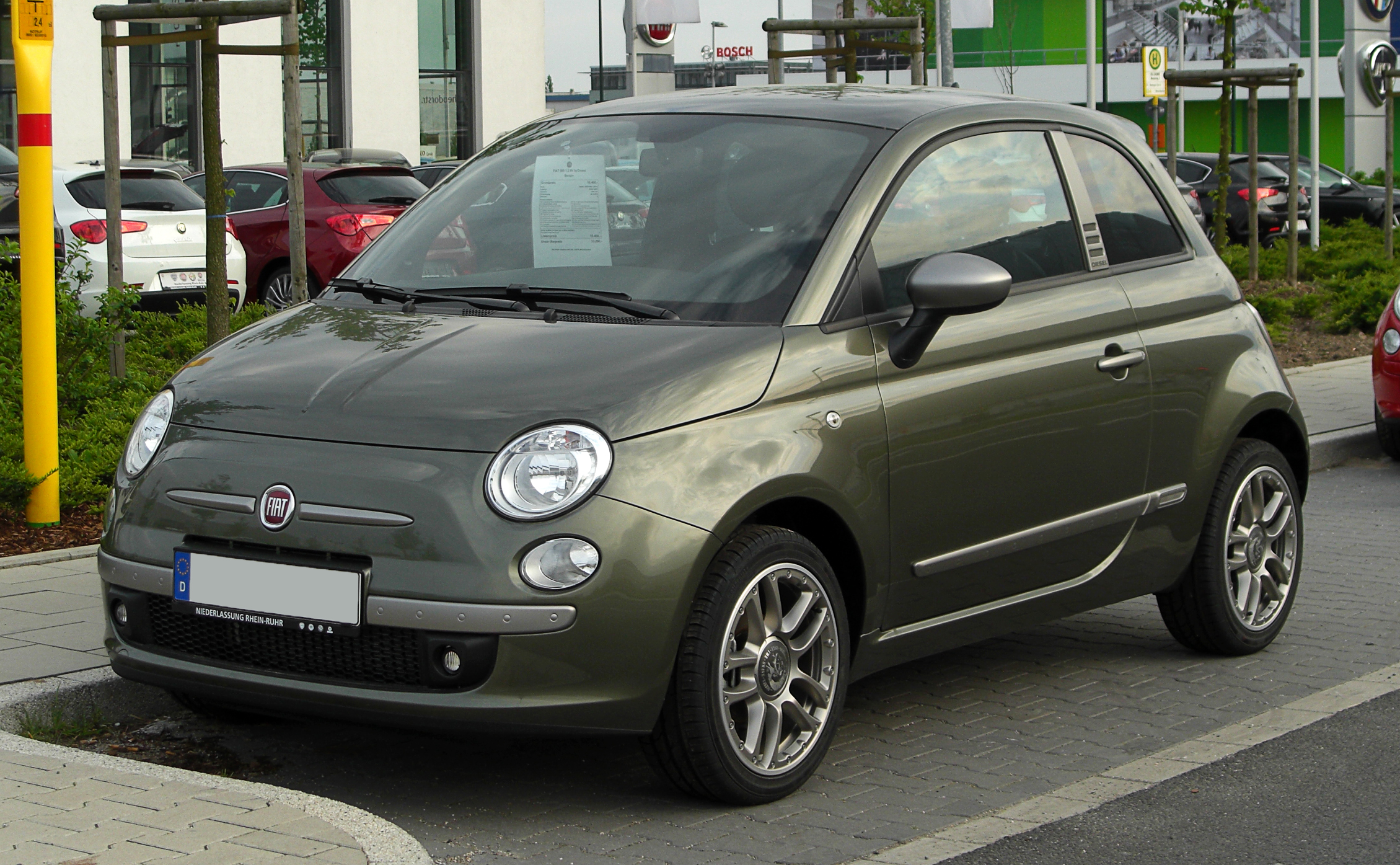 Fiat 500 1.2 8V by Diesel